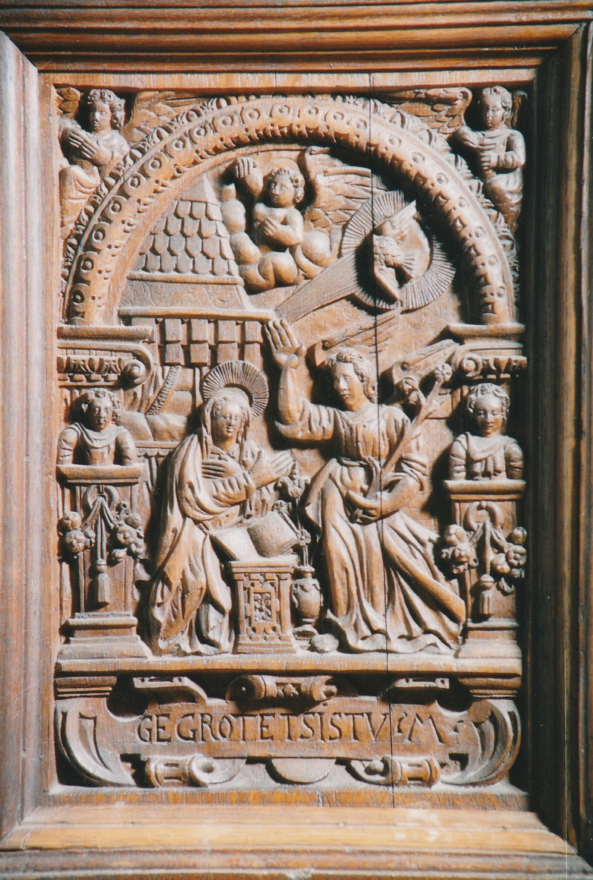 Dieses Bild war ursprünglich Teil einer alten Kanzel